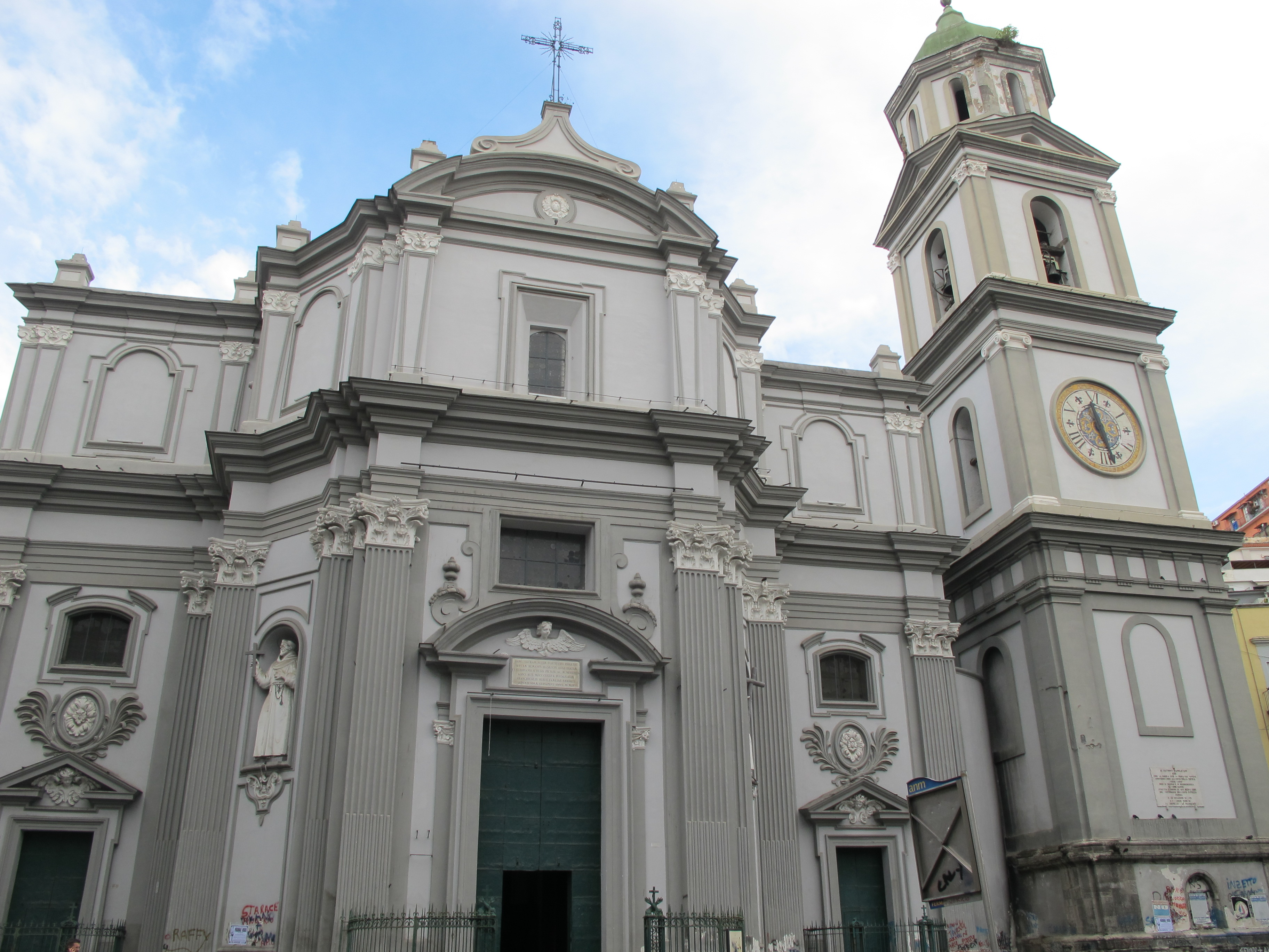 Chiesa di Santa Maria della Sanità (Napoli)